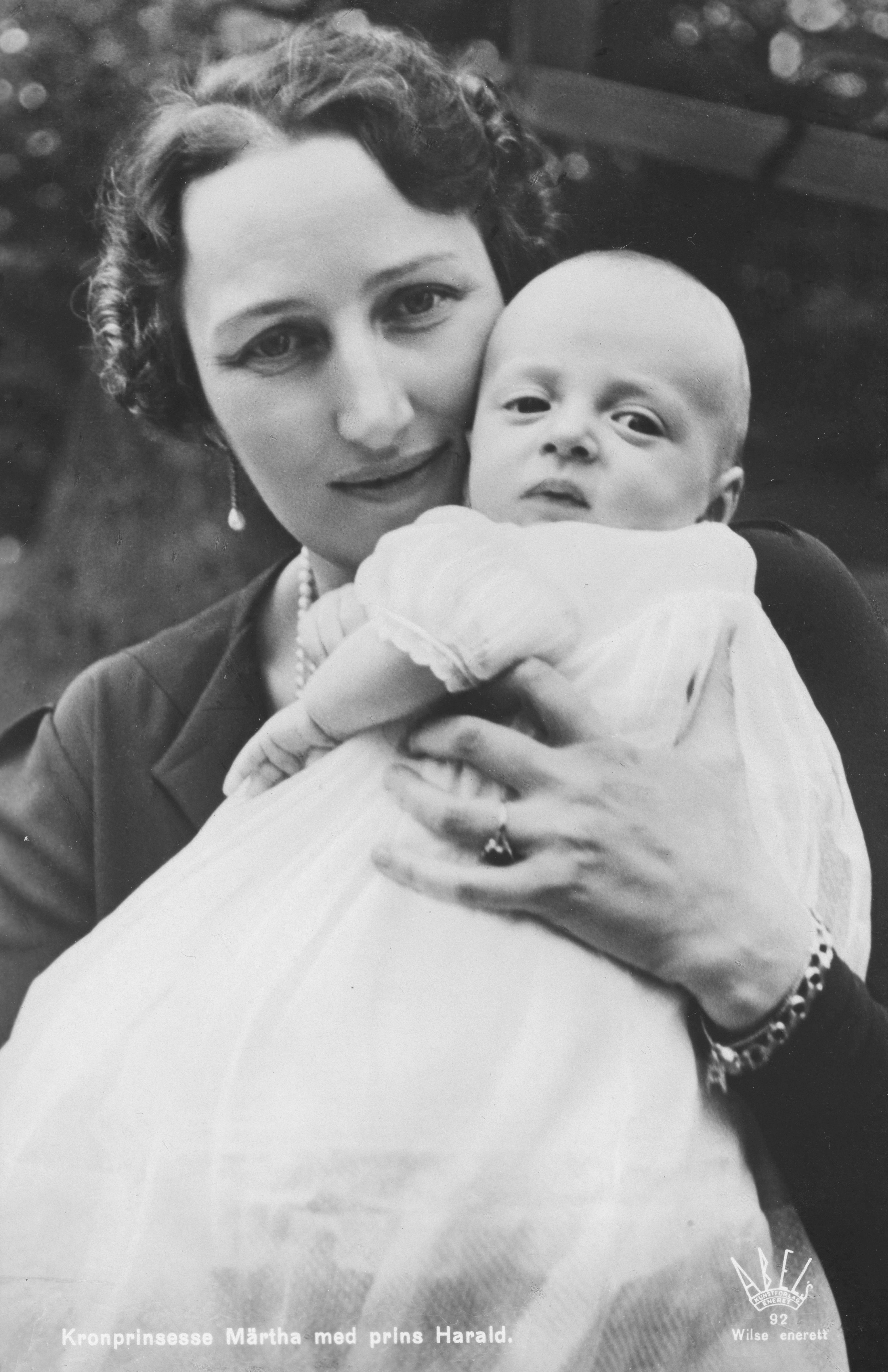 Bildet er hentet fra Nasjonalbibliotekets bildesamling Depicted person: Harald V konge av Norge Depicted person: Märtha kronprinsesse av Norge